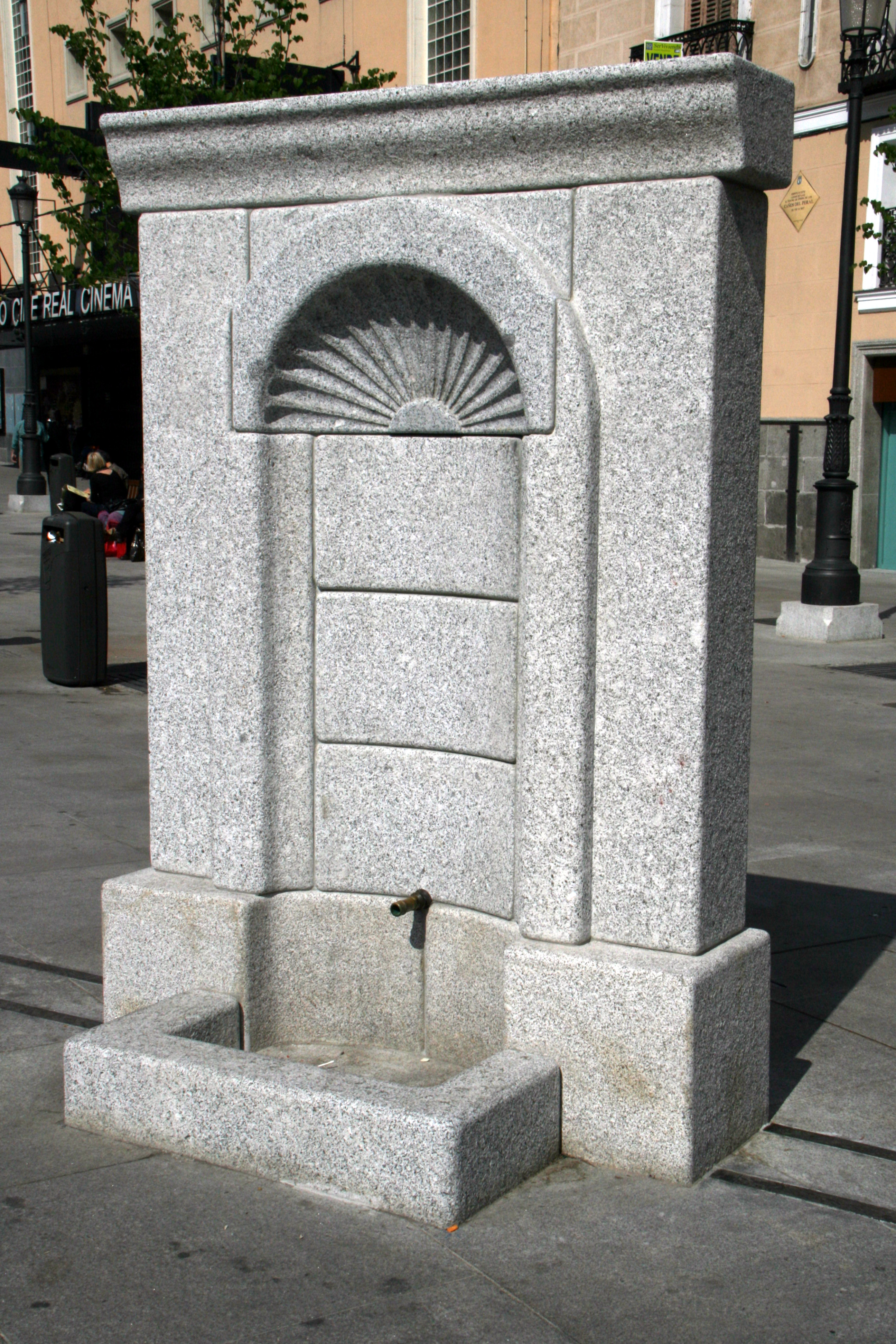 Fuente recostruida en la Plaza de la Ópera (Plaza de Isabel II, Madrid)